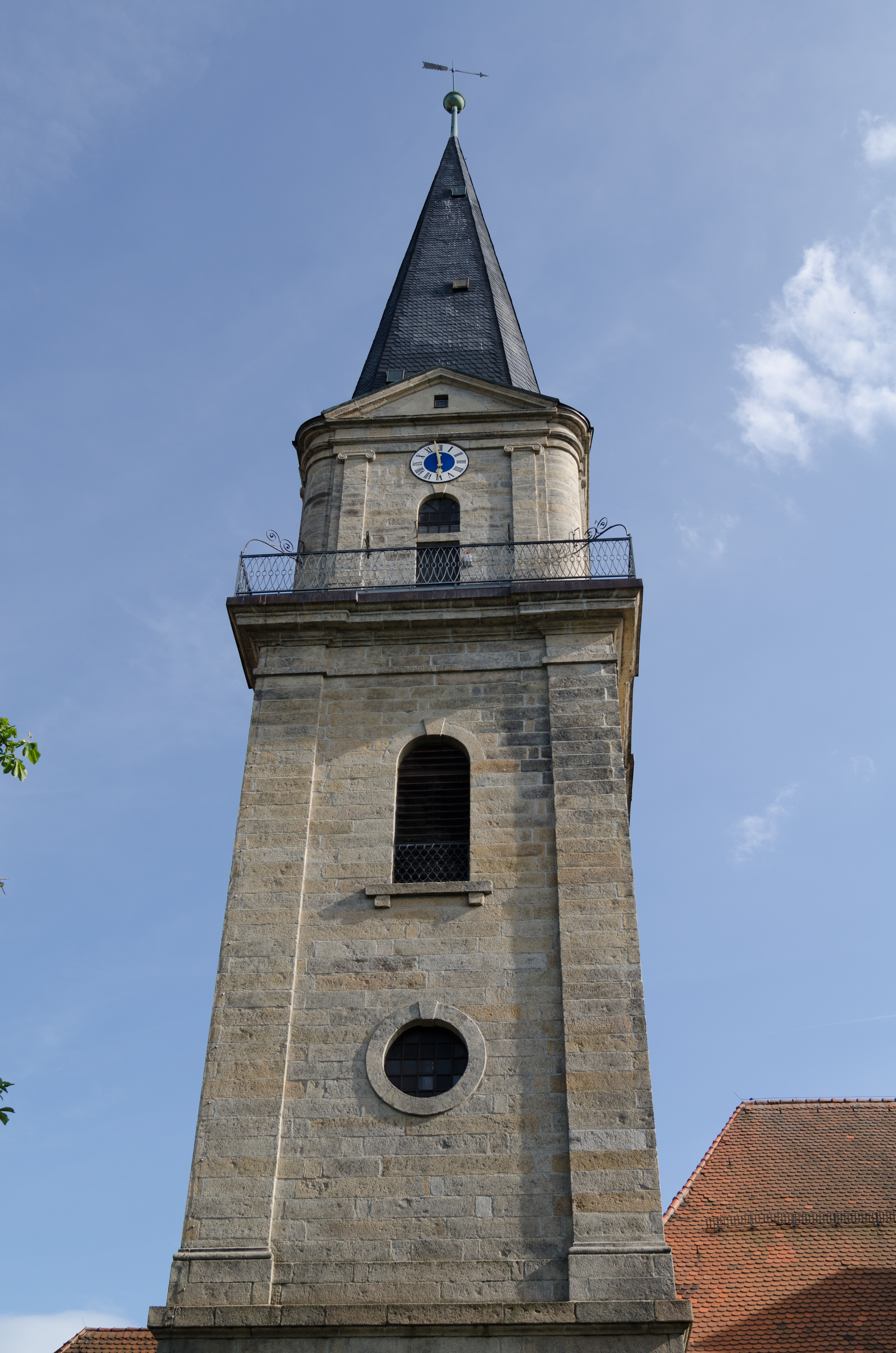 Marktredwitz, Evangelisch-lutherische Pfarrkirche St. Bartholomäus